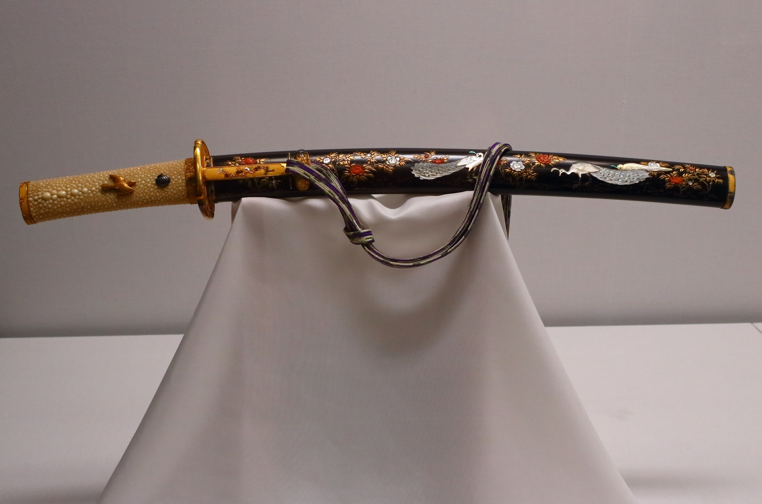 脇指 - 黒壇地花鳥蒔絵螺鈿脇指（こくたんじかちょうまきえらでんわきざし）、江戸時代・19世紀。金具：後藤一乗作。東京国立博物館。